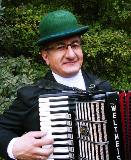 Członek Kapeli Warszawskiej.